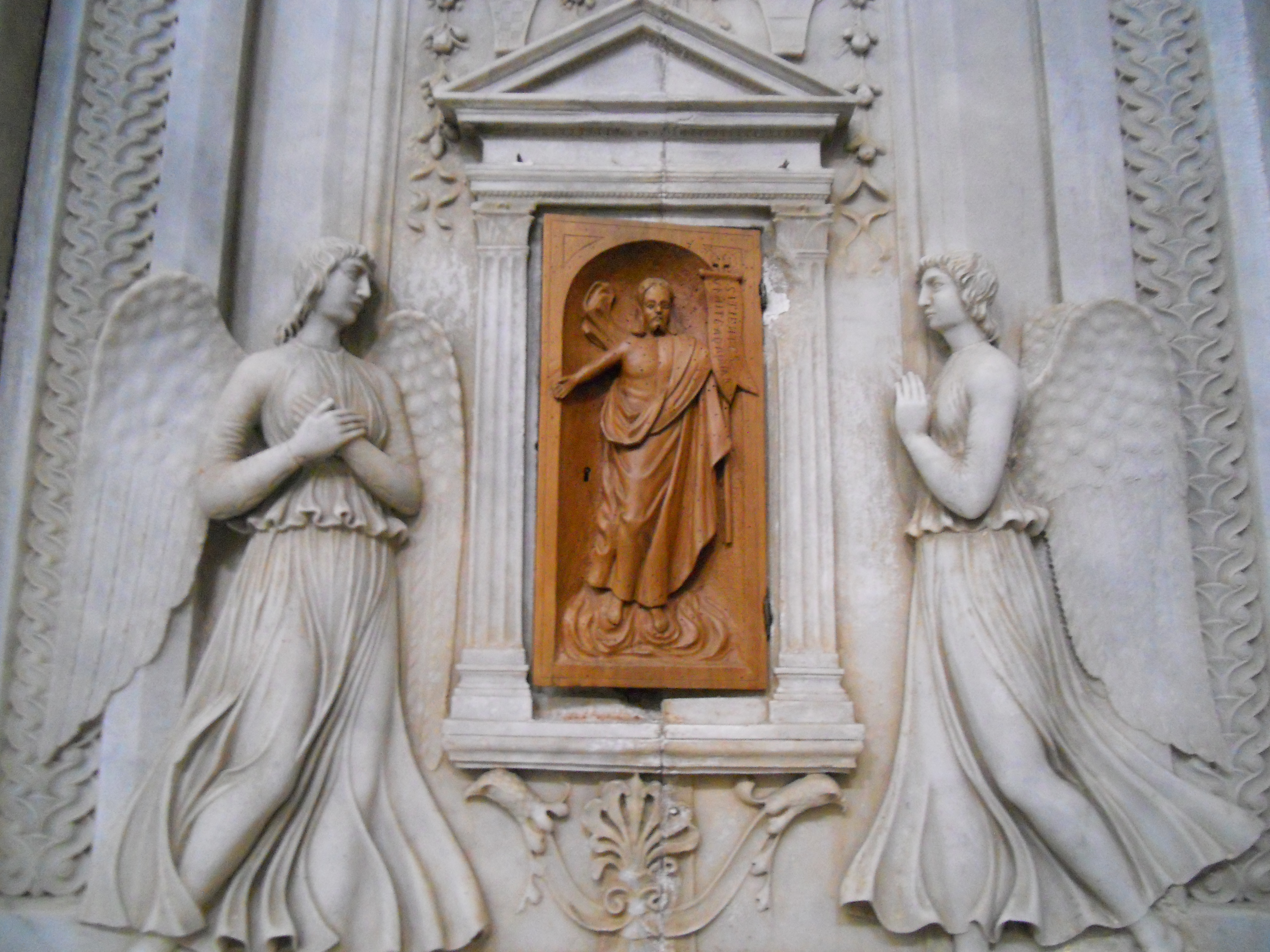 Tabernacolo realizzato dallo Stagi nella chiesa di Retignano